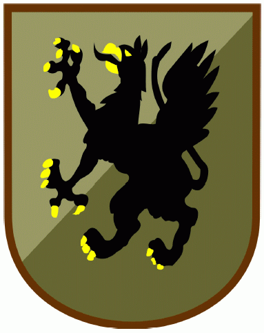 Inspektorat Wsparcia Sił Zbrojnych – oznaka rozpoznawcza na mundur wyjściowy – 2013, Polska.